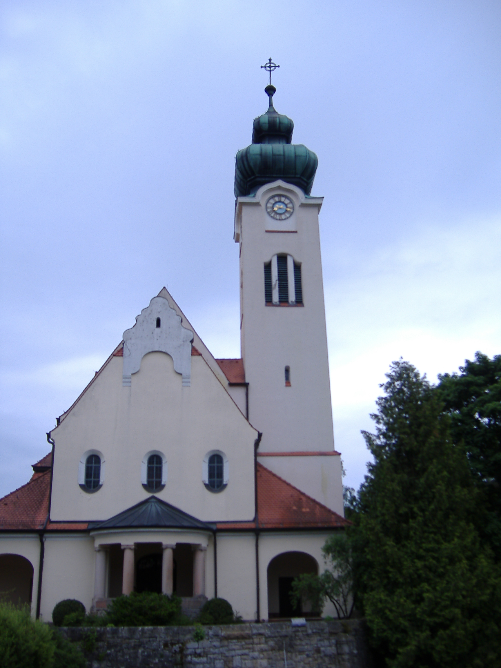 Vorderfornt der Marienkirche